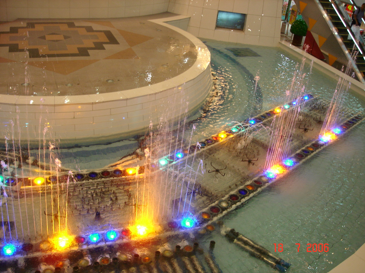 摘要 近期荃灣廣場音樂噴泉表演